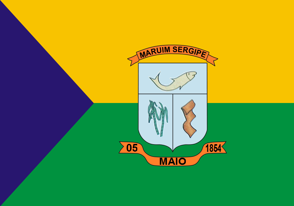 Bandeira Municipal de Maruim